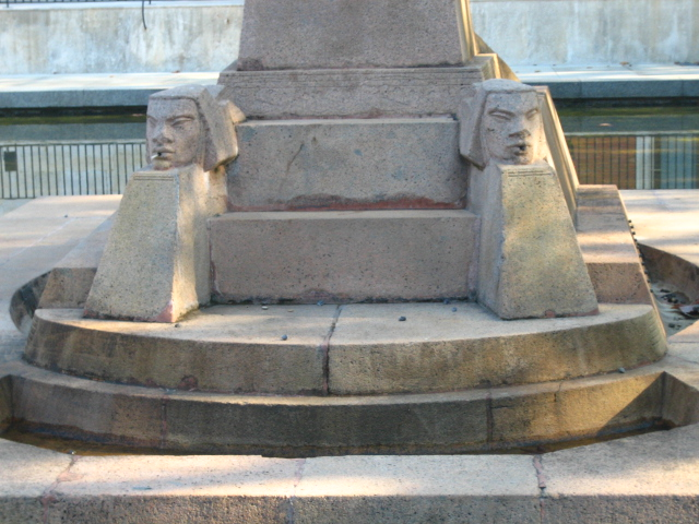 Monumento a Arriaga, de Durrio, en Bilbao